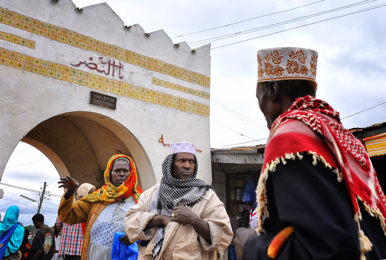 Ethiopia